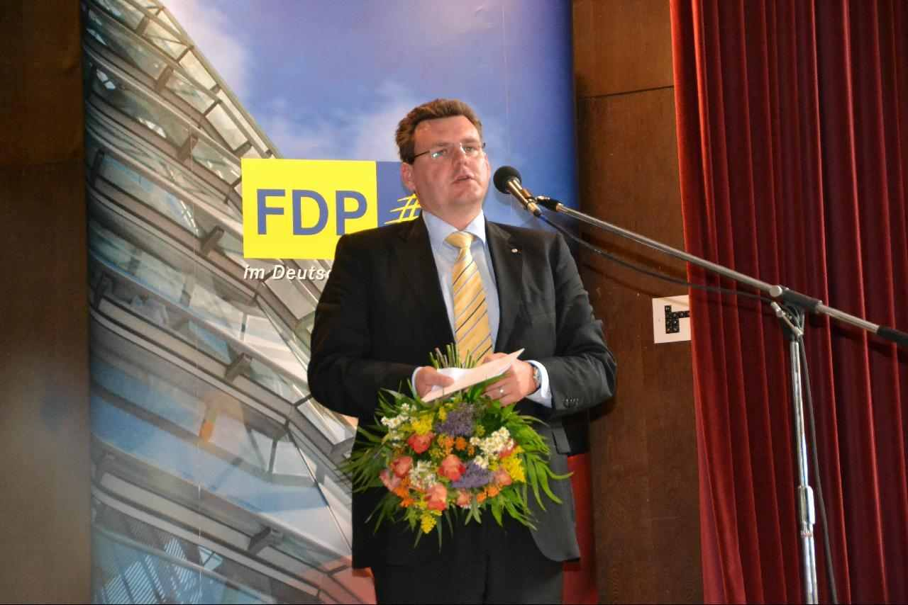 Gino Leonhard, Landesvorsitzender der FDP Mecklenburg-Vorpommern